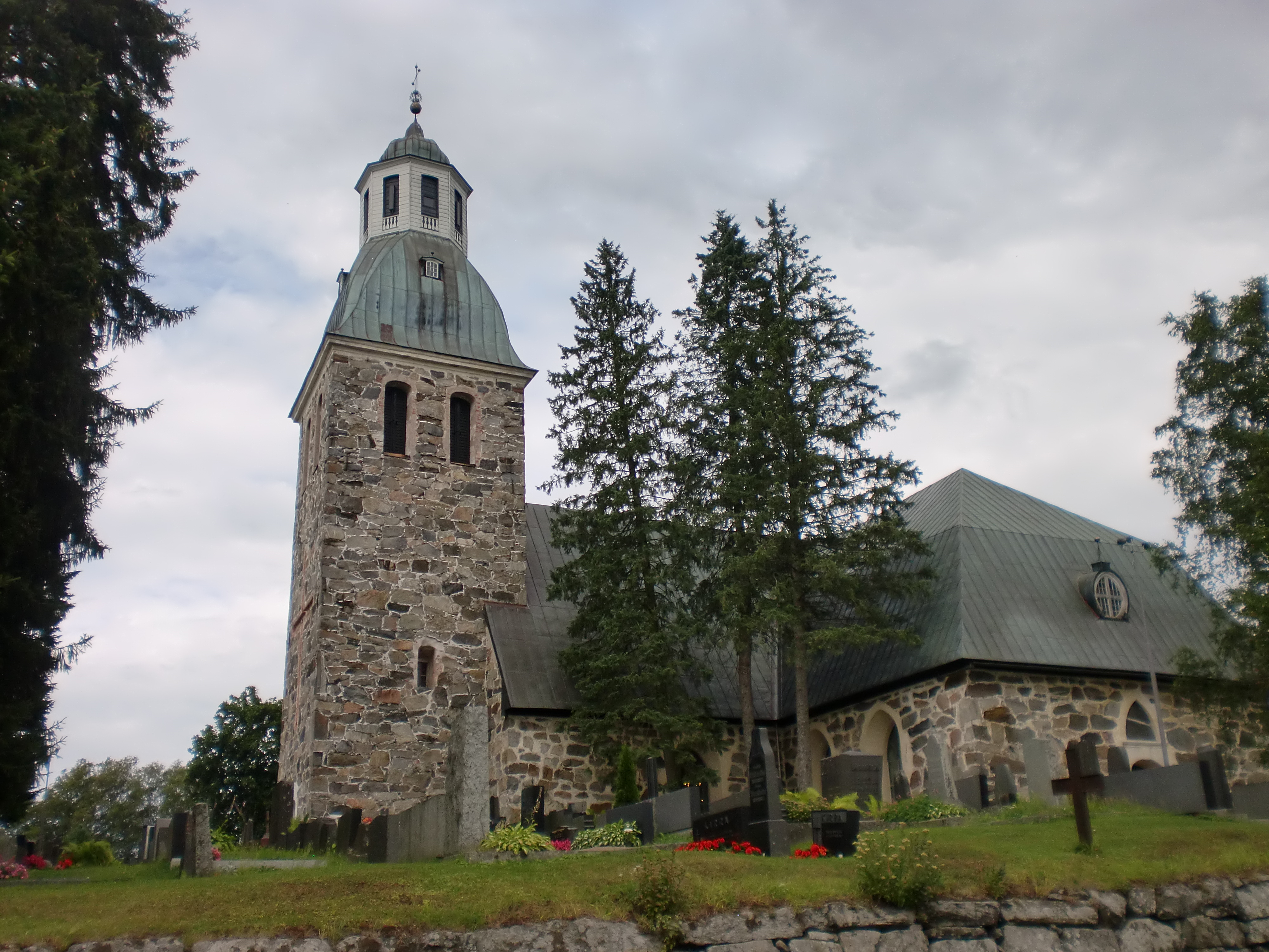 Huittisten kirkko; kirkkorakennus Huittisten Lauttakylässä